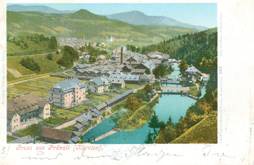 Železarna na Prevaljah